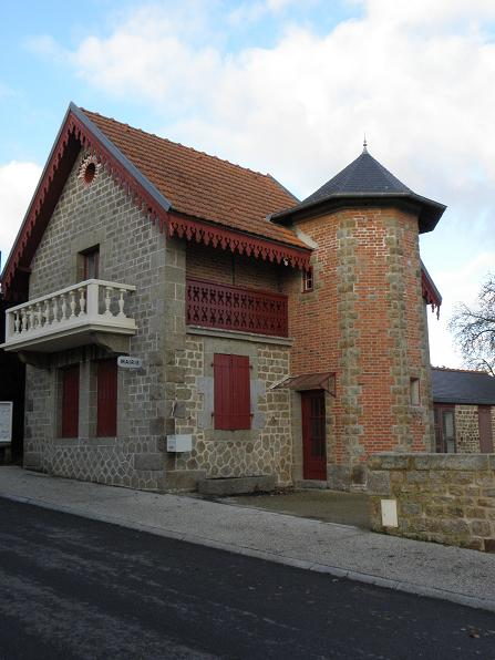 Le Châteliier (35) Mairie.